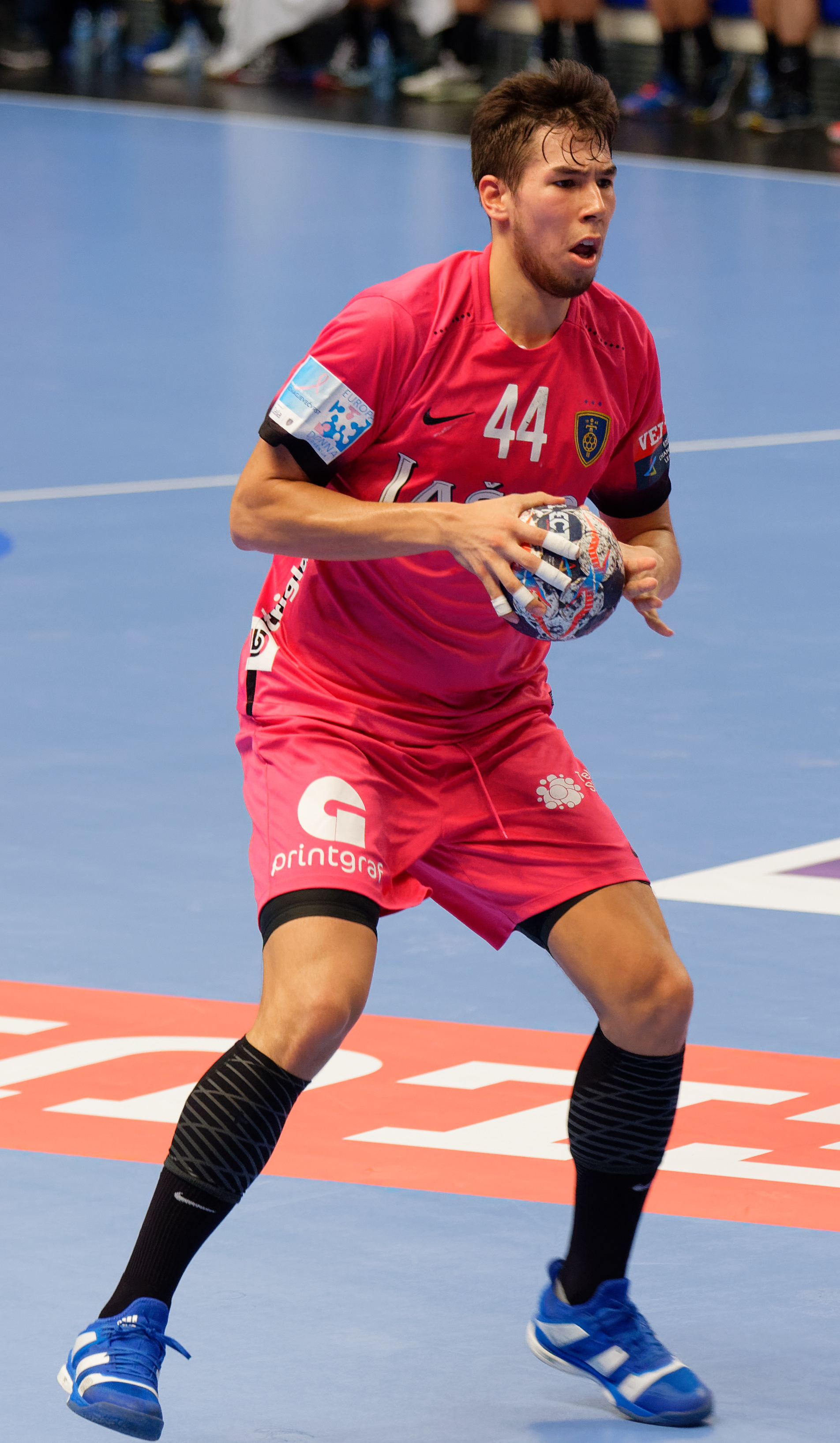 Rencontre de phase de groupe de la ligue des champions 2017/18 entre le PSG et Celje A Coubertin le 8 octobre 2017.